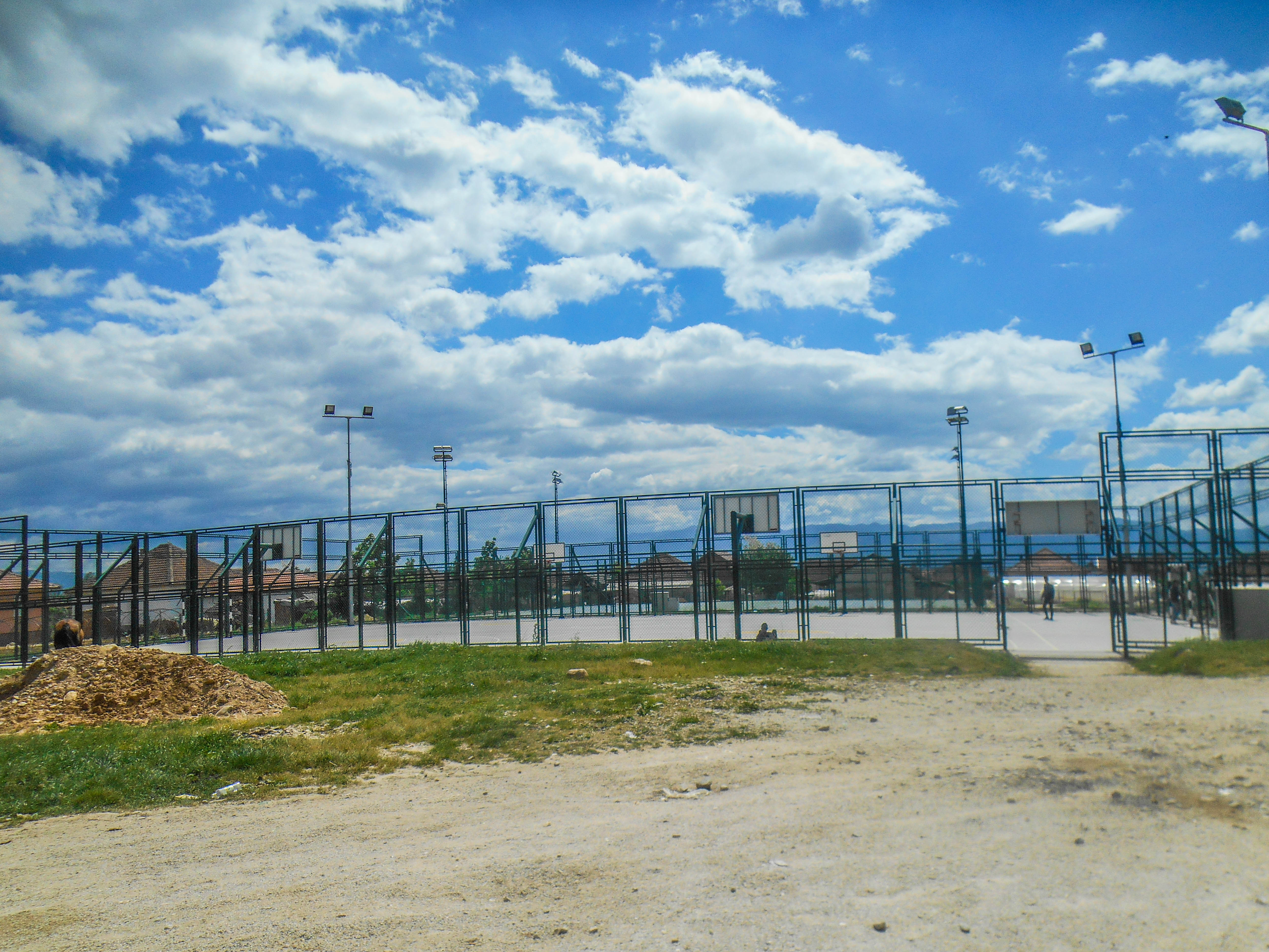 Спортско игралиште - Ангелци